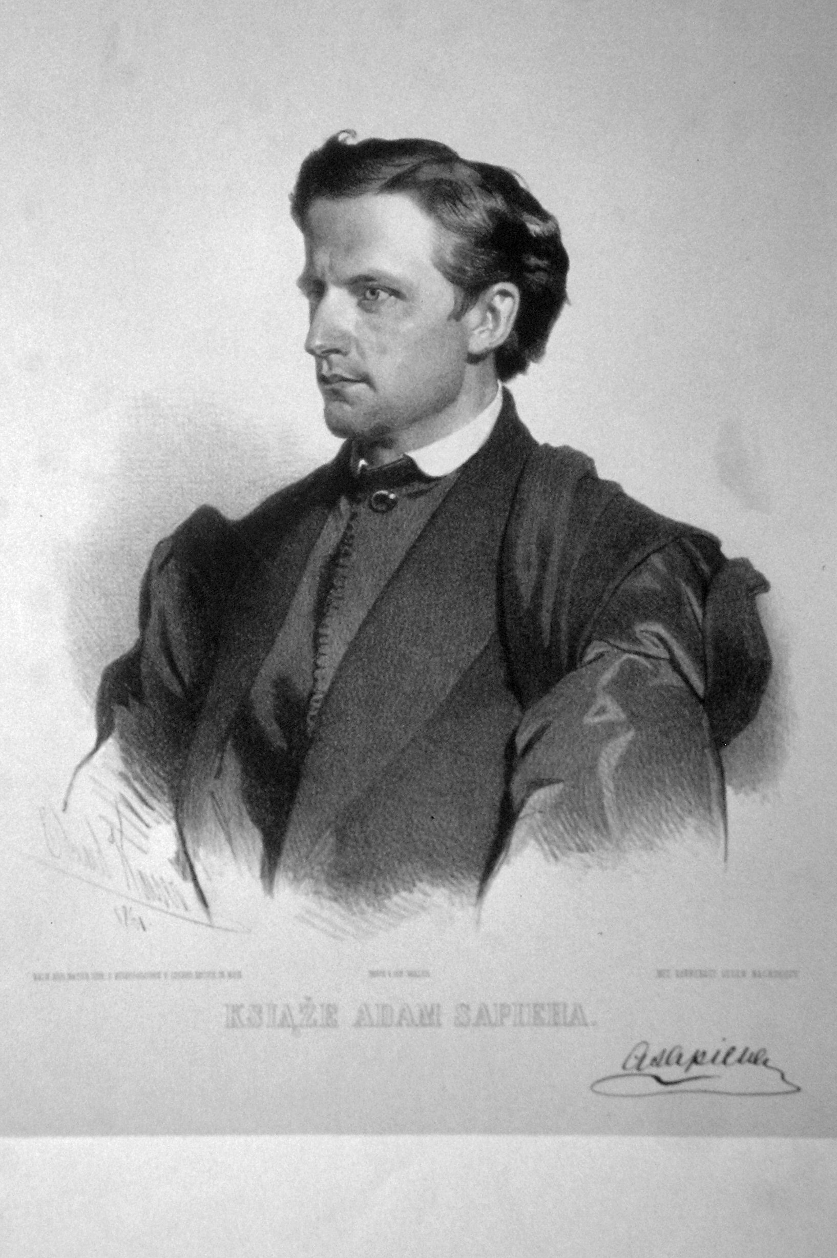 Adam Fürst Sapieha (1828-1903), polnischer Großgrundbesitzer. Lithographie von Eduard Kaiser, 1861